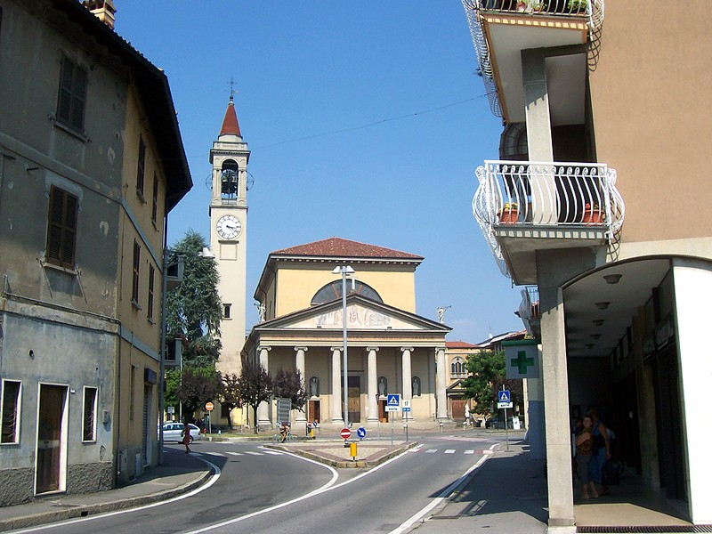 Vaprio d'Adda - Chiesa Parrocchiale di S. Nicolò